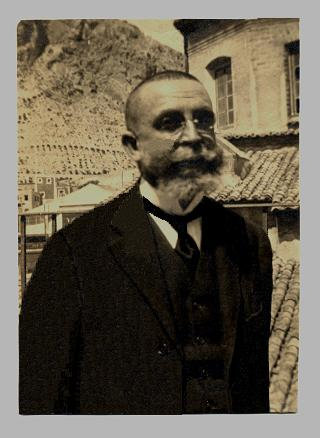 El dr Montesinos elegido Presidente Asoc Padres de Familia Católicos